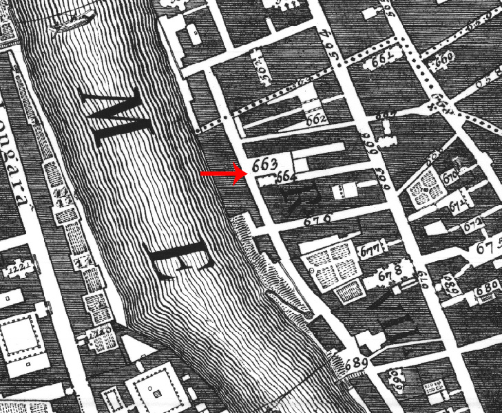 Estratto della pianta del Nolli con l'indicazione della demolita chiesa di San Nicola degli Incoronati